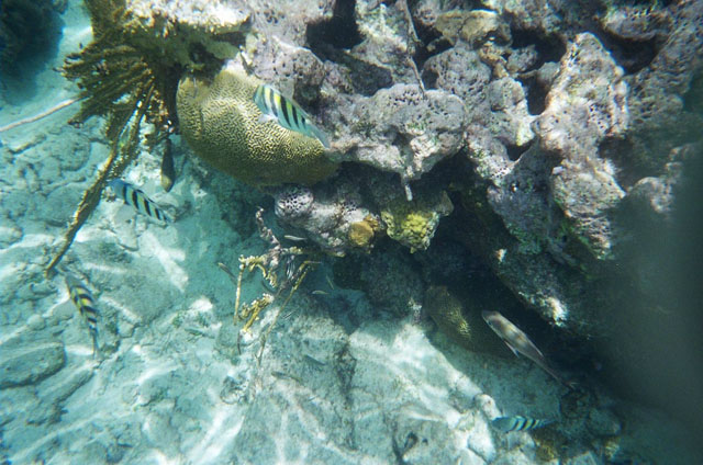 coral